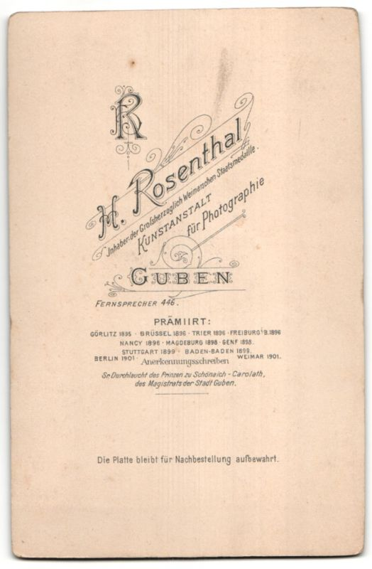 Revers des Kartonträgers der Kabinettfotografie der „Kunstanstalt für Photographie“ mit dem Künstlermonogramm aus den beiden verschlungenen Buchstaben H und R von H. Rosenthal in Guben, laut Aufdruck „Inhaber der Großherzoglich Weimarschen Staatsmedaille“ Unter der Fernsprech-Nummer des Unternehmers finden sich chronologisch mit Jahreszahlen die Daten der Prämierungen des Künstlers: „Görlitz 1895, Brüssel 1896, Trier 1896, Freiburg i.B. 1896, Nancy 1898, Magdeburg 1898, Genf 1898, Stuttgart 1899, Baden-Baden 1899 Berlin 1901, Weimar 1901“ Ein „Anerkennungsschreiben Sr. Durchlaucht des Prinzen zu Schöneich-Carolath, des Magistrats der Stadt Guben“ hebt der Vordruck noch gesondert hervor.